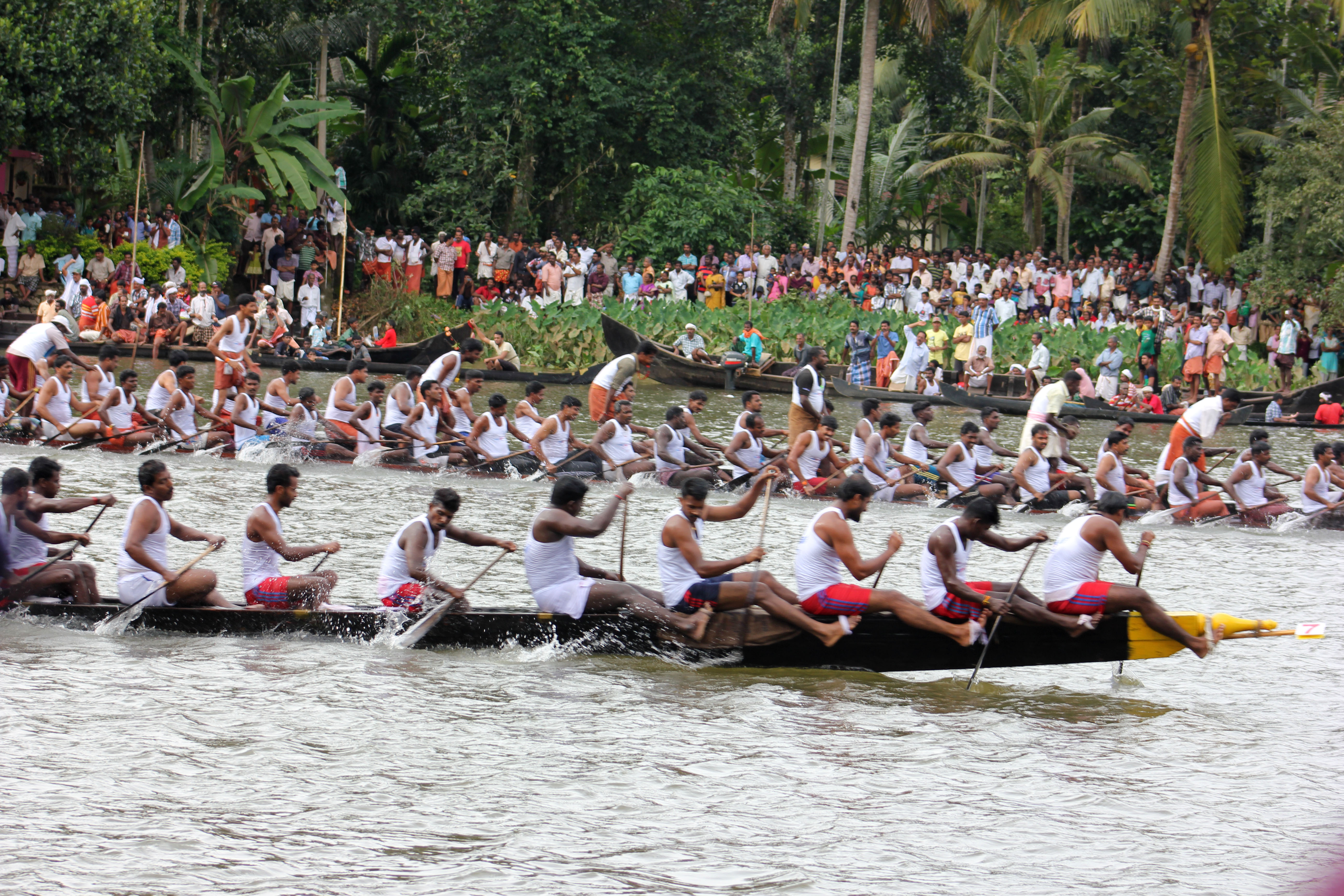 നീരേറ്റുപുറം പമ്പാ ജലോത്സവം ആലപ്പുഴ ജില്ലയിലെ നീരേറ്റുപുറം ആറ്റിൽ നടക്കുന്ന ജലോത്സവമാണ് നീരേറ്റുപുറം പമ്പാ ജലോത്സവം